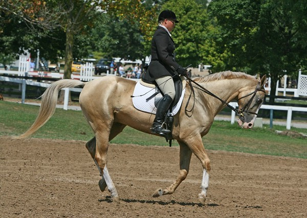 Akhal Teke Stallion - Gaman